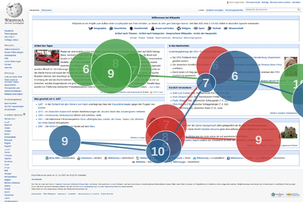 Gazeplot-Darstellung von Eye-Tracking-Daten auf der Wikipedia Startseite von drei Personen.